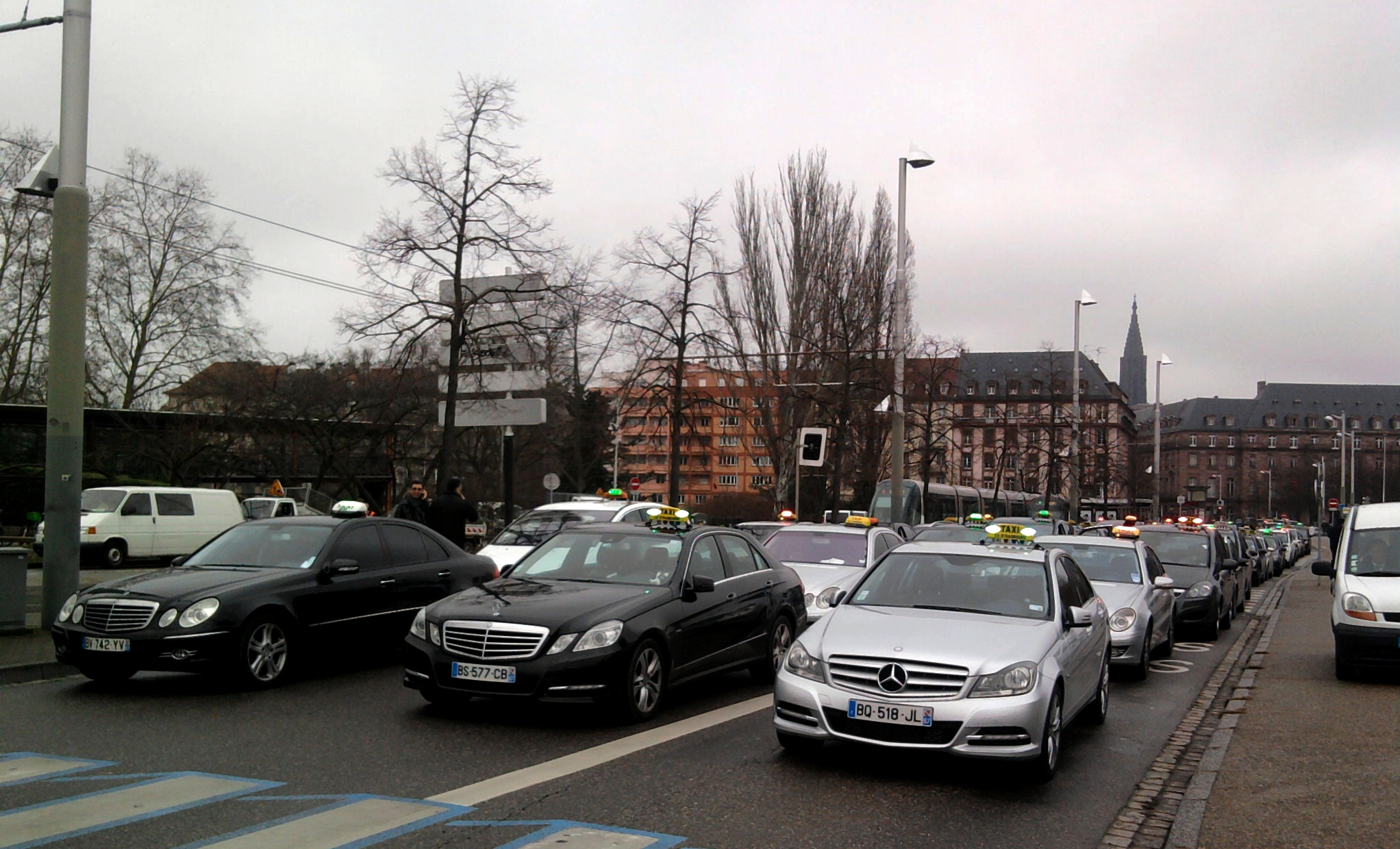 Manifestation des taxis le 10 janvier 2013, parc de l'Etoile à Strasbourg